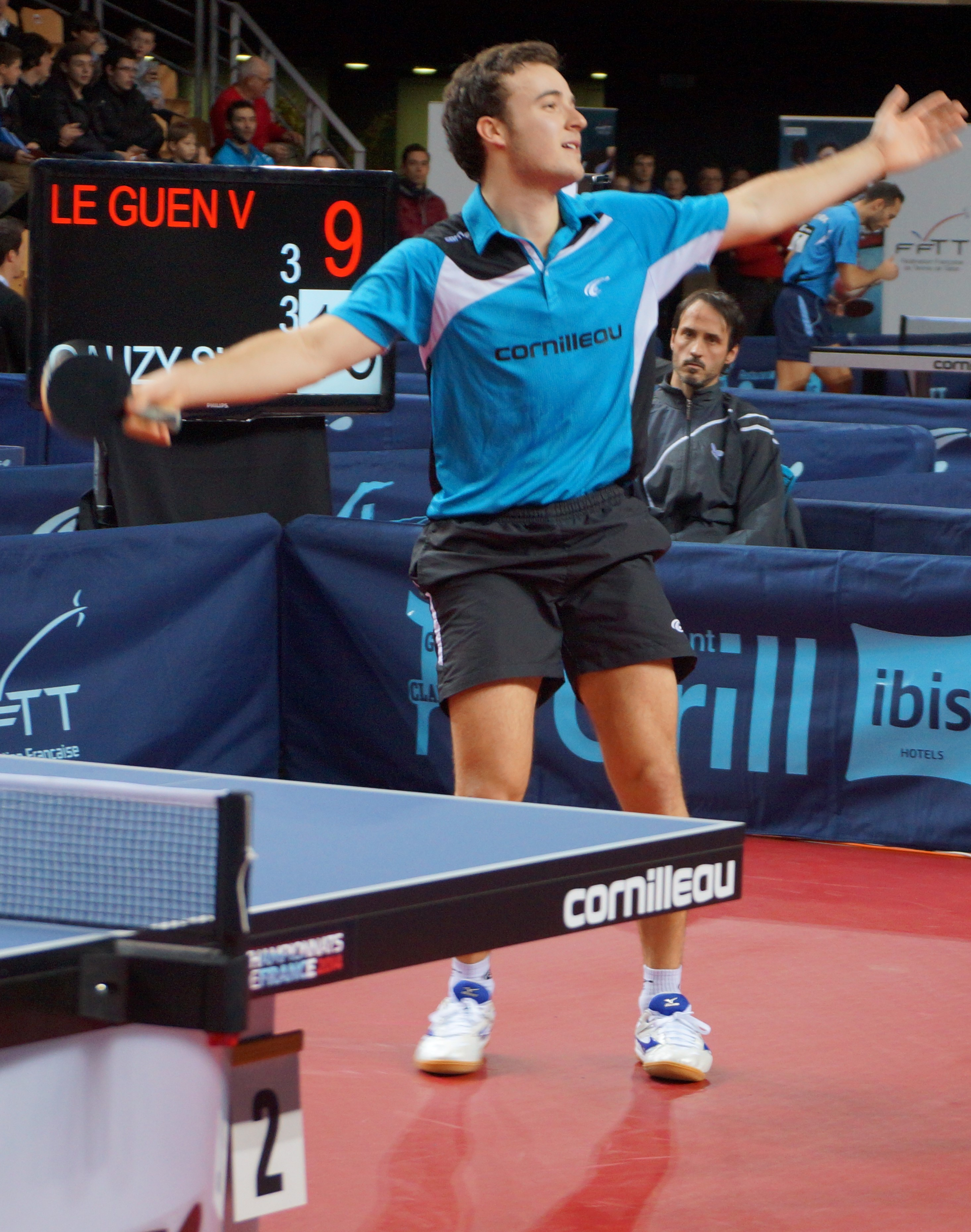 Simon Gauzy aux Championnats de France 2014